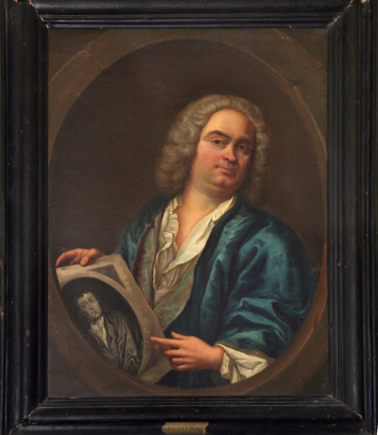 Portrait von Paolo Antonio Rolli